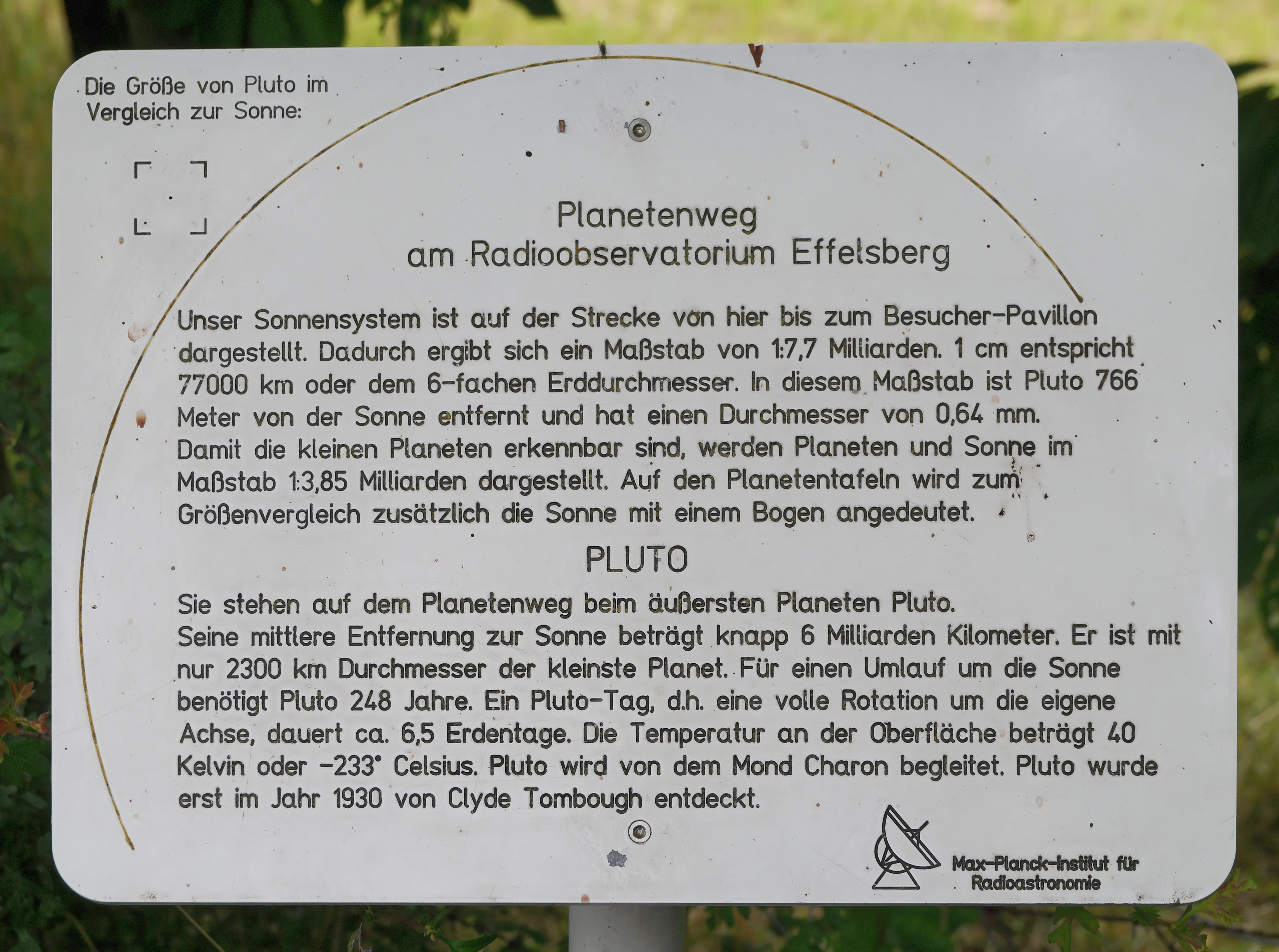 Informationstafel zum (ehemaligen) Planeten Pluto auf dem Planetenweg am Radioteleskop Effelsberg